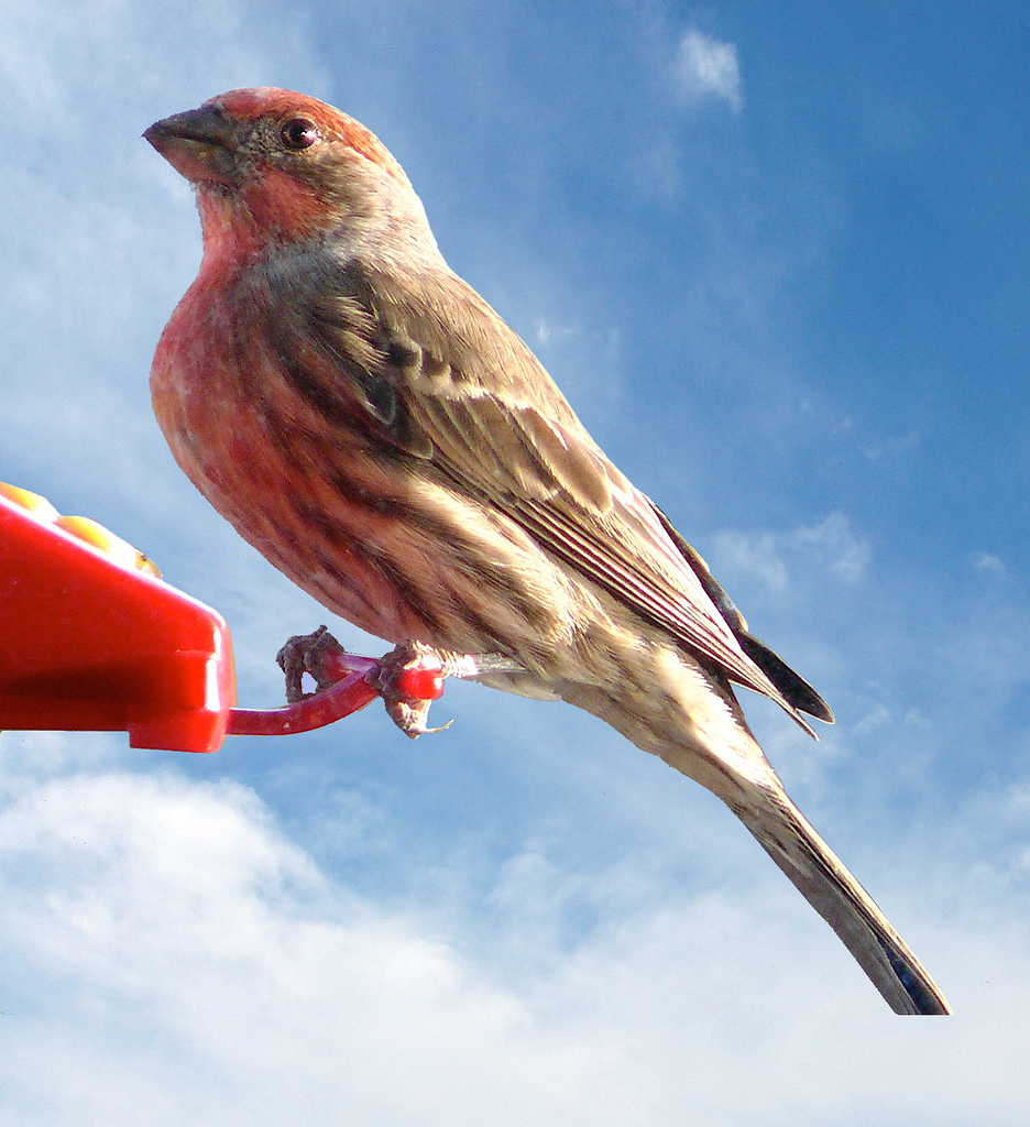 Carpodacus mexicanus; Roselin familier